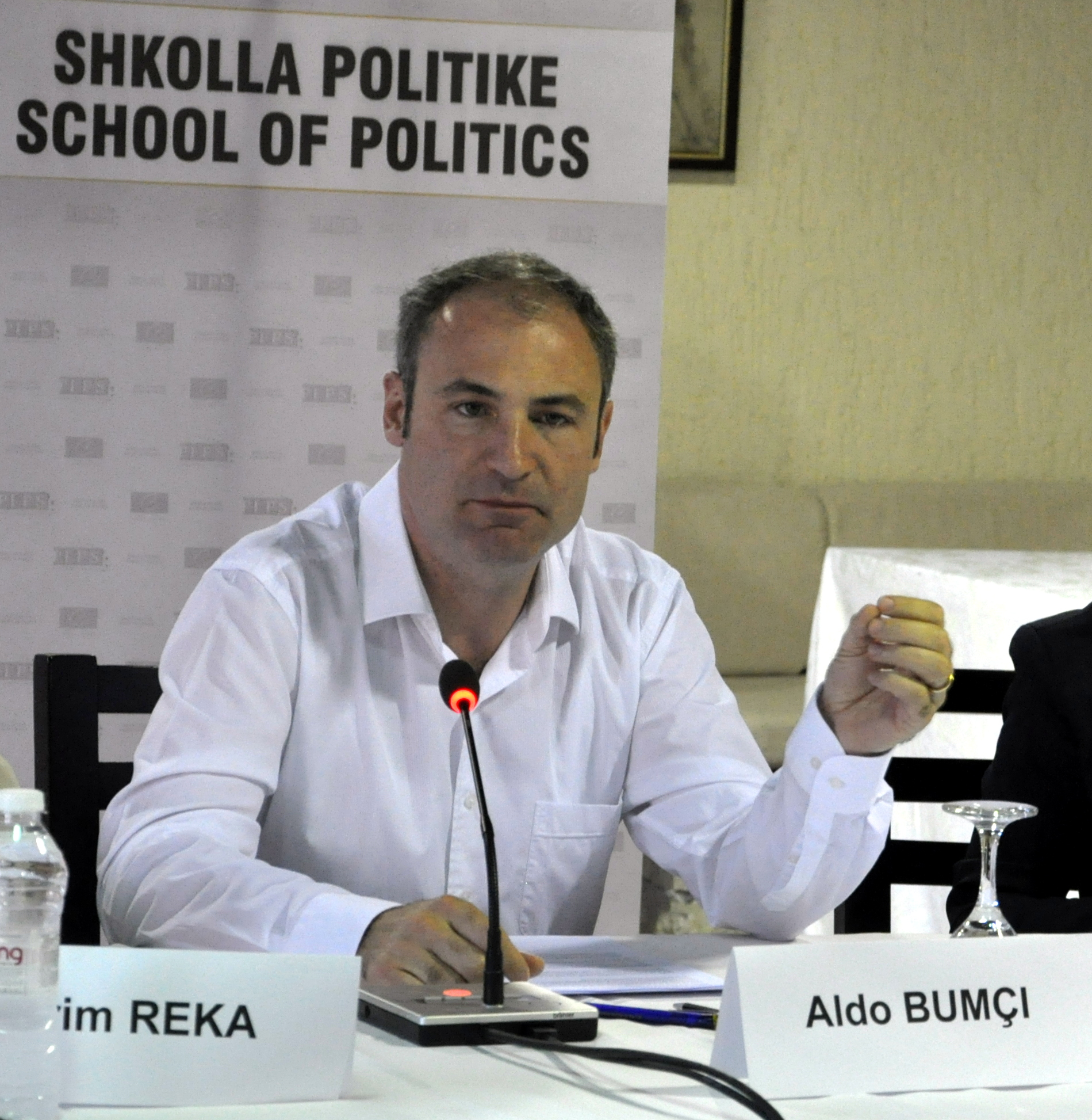 Aldo Bumçi